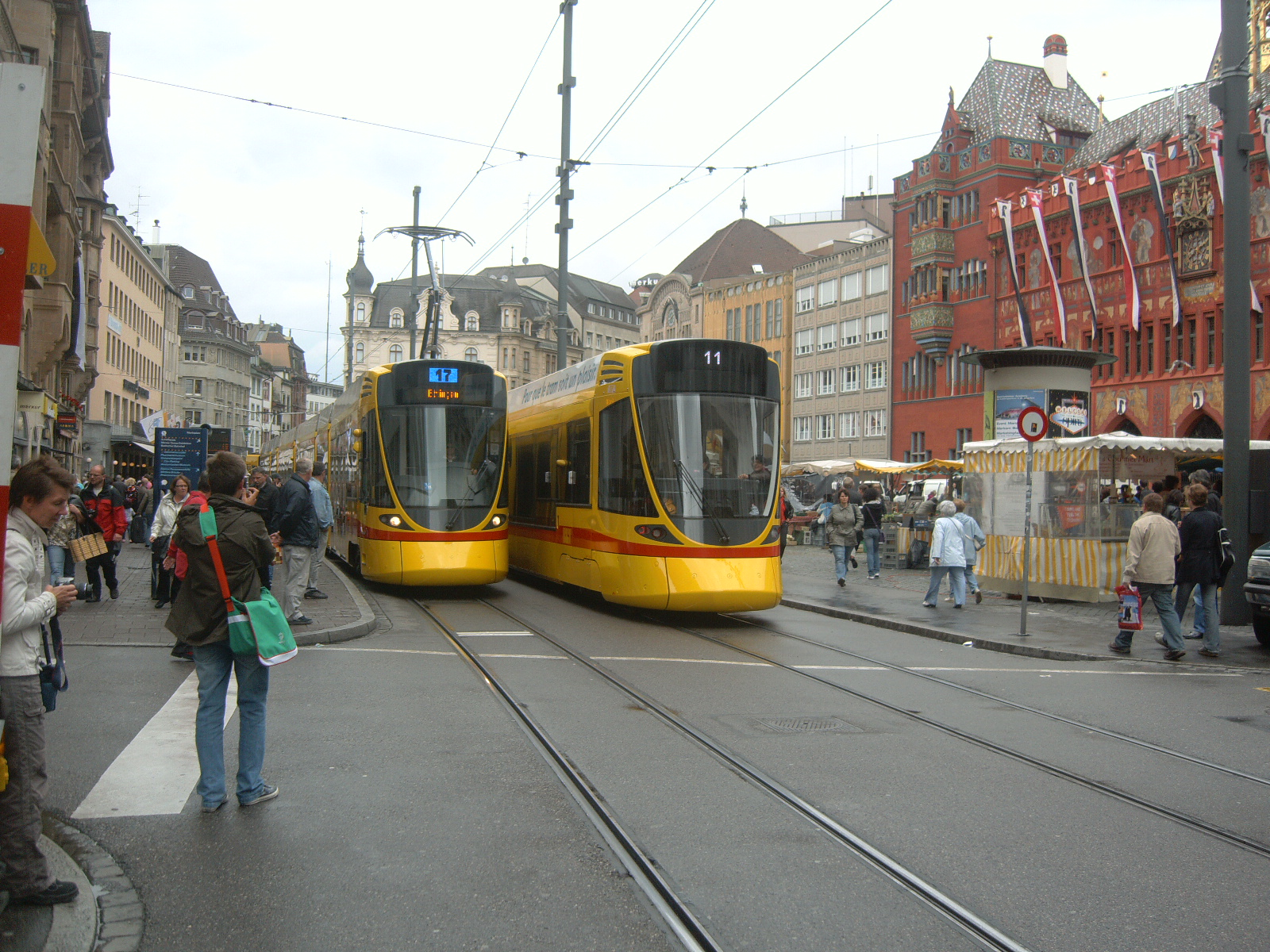 2 Stadler Tango-Trams in Marktplatz in Basel.